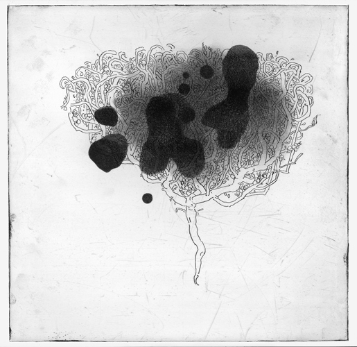 Print